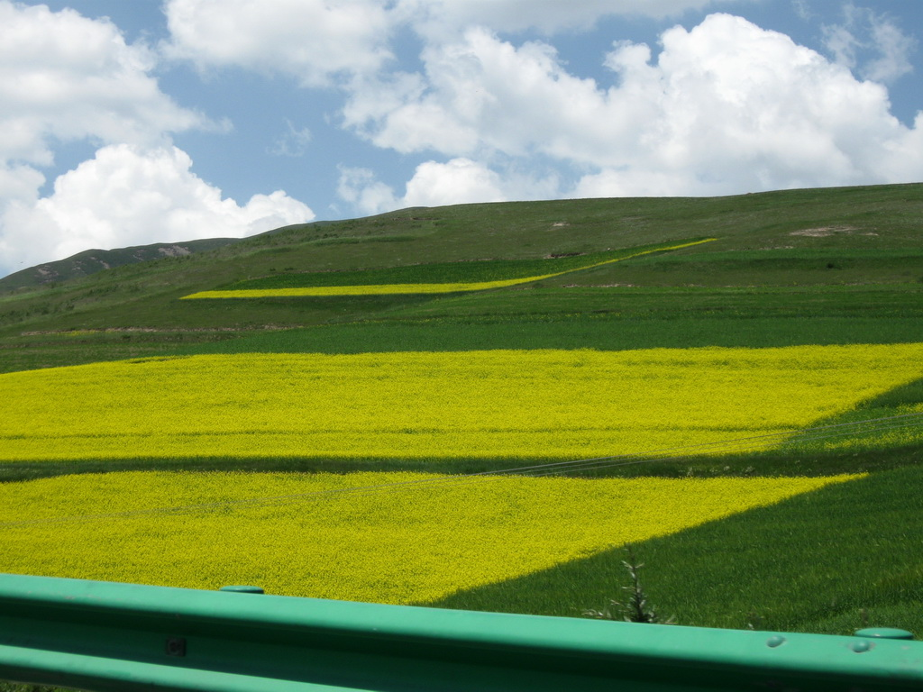 Qinghai-Tibet Plateau 青藏高原